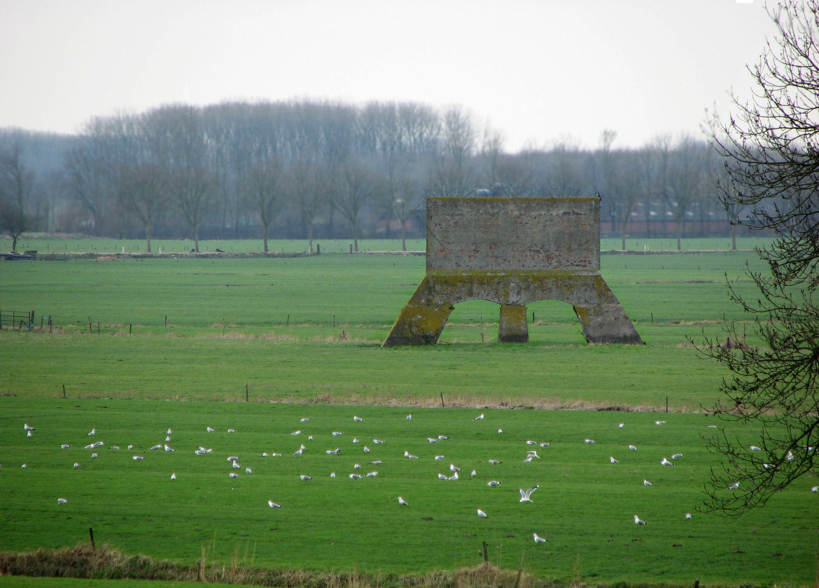 Kogelvanger bij Werk aan het Spoel, onderdeel van de Nieuwe Hollandse Waterlinie.